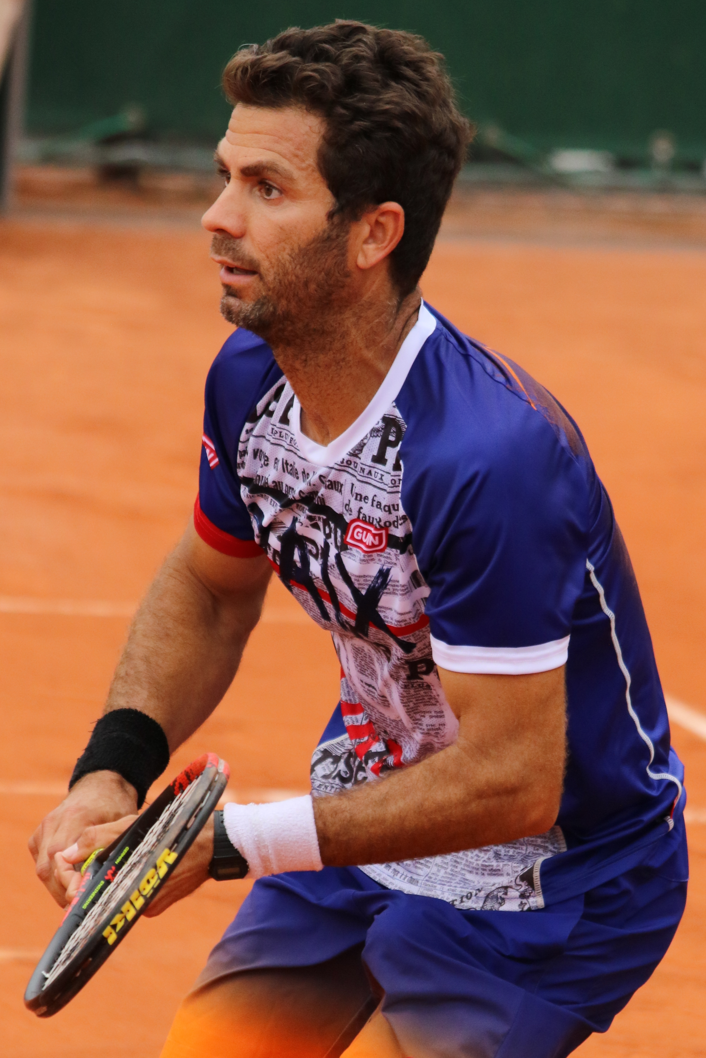 Rojer RG19 (25)